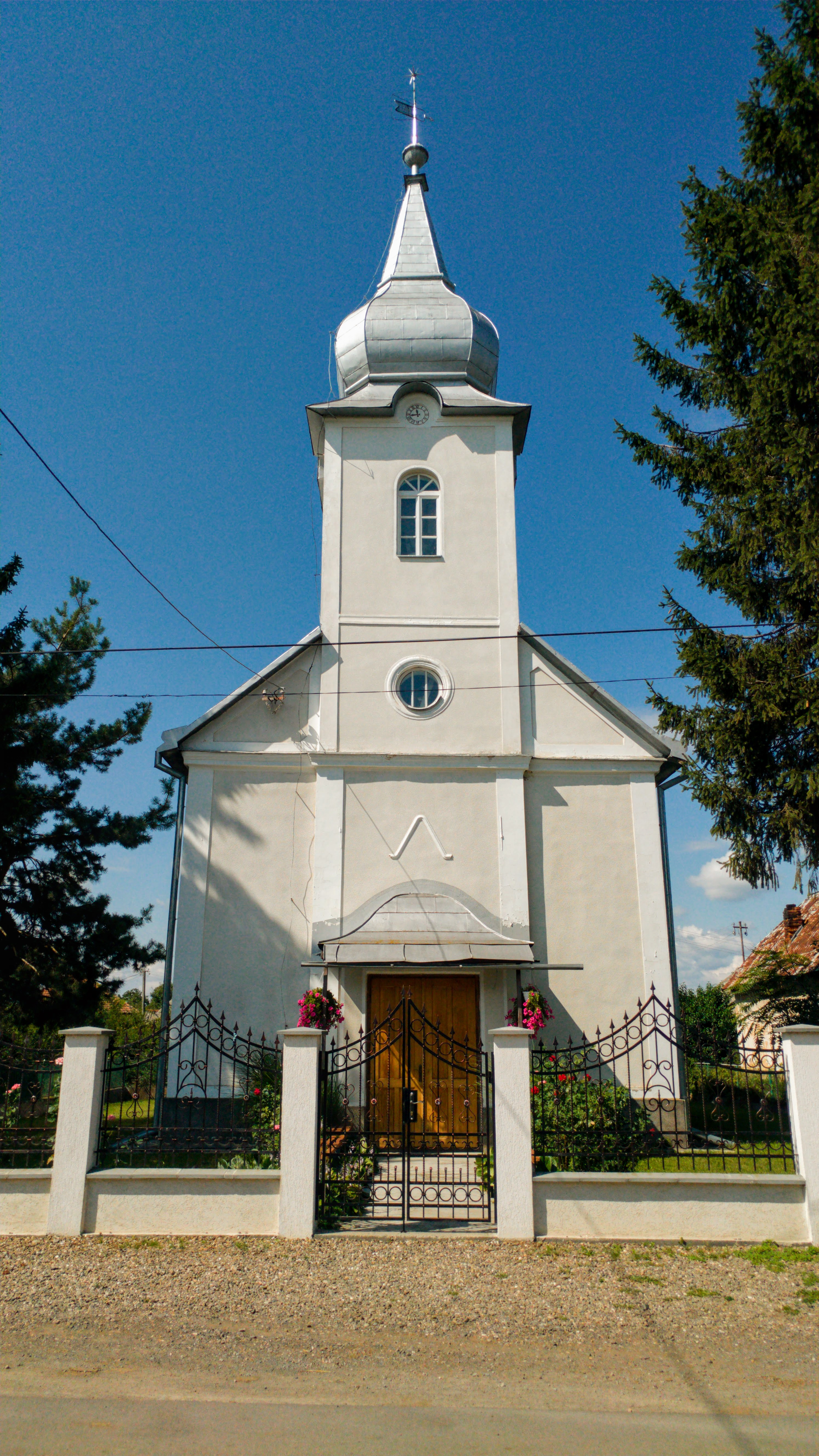 Református templom Mátyfalván